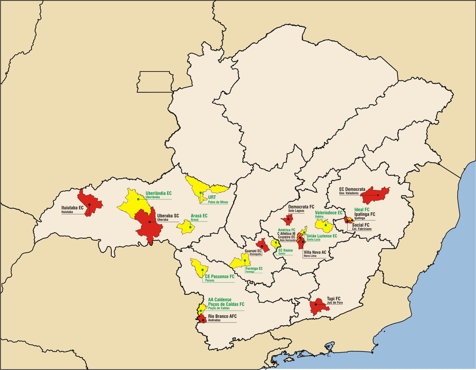 Mapa dos participantes do Campeonato Mineiro da Primeira Divisão 2008